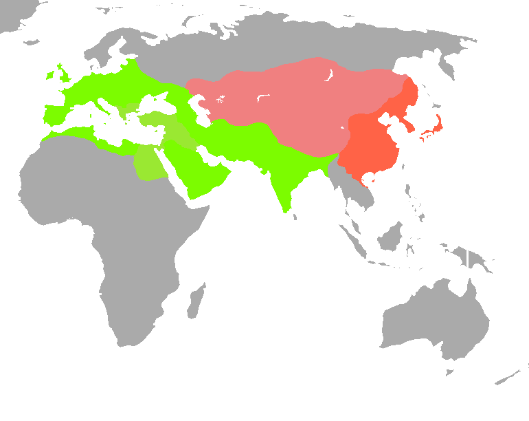 十二生肖使用范围